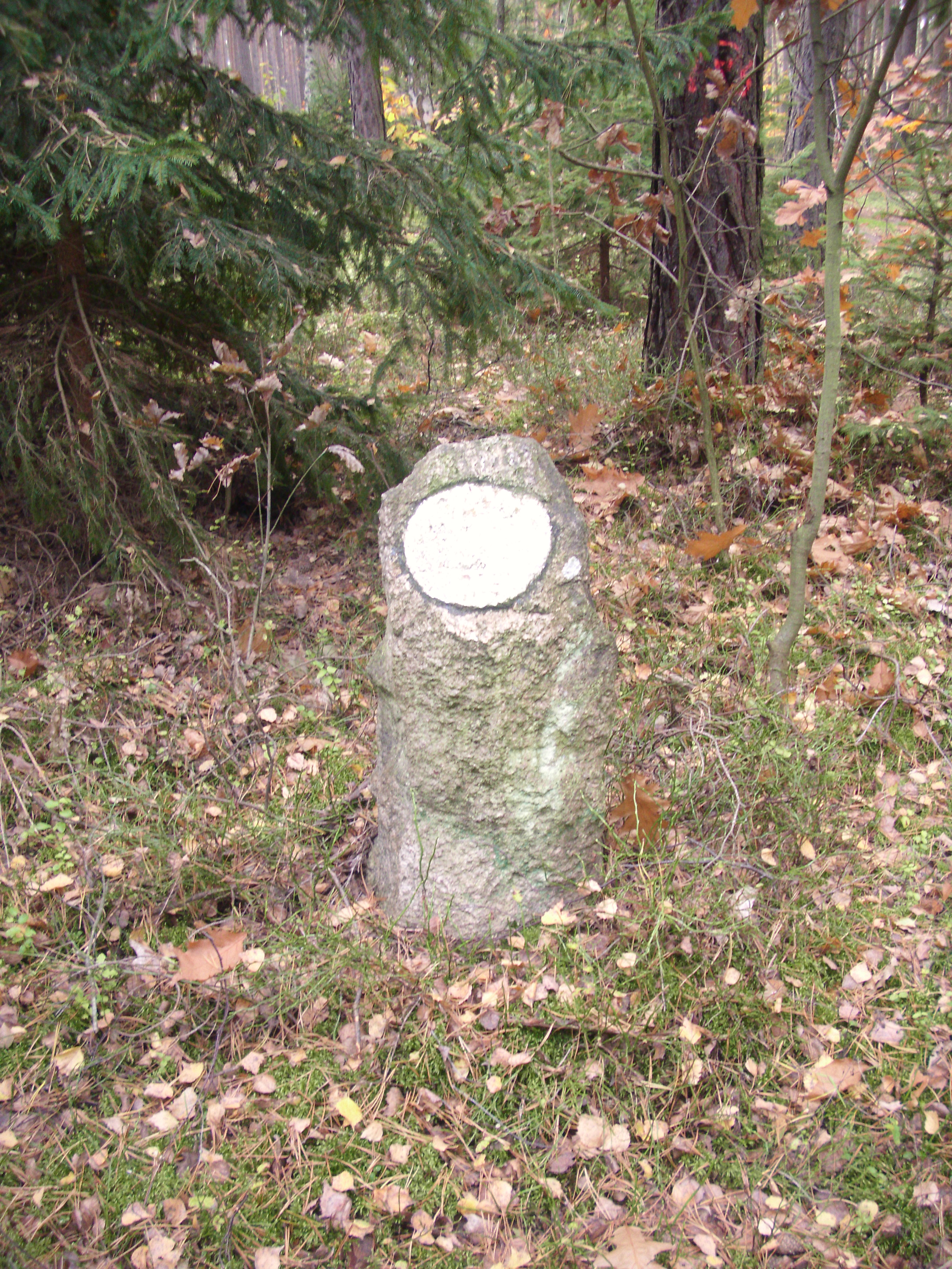 alter Jagenstein im Naturschutzgebiet Klautzkesee und Waldmoore mit Kobbelke, Naturpark Schlaubetal, Brandenburg